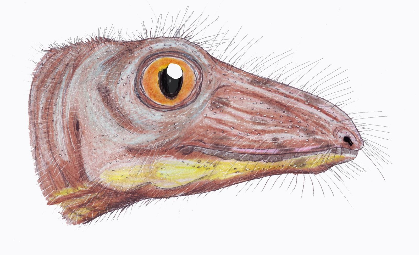 Nikkasaurus tatarinovi